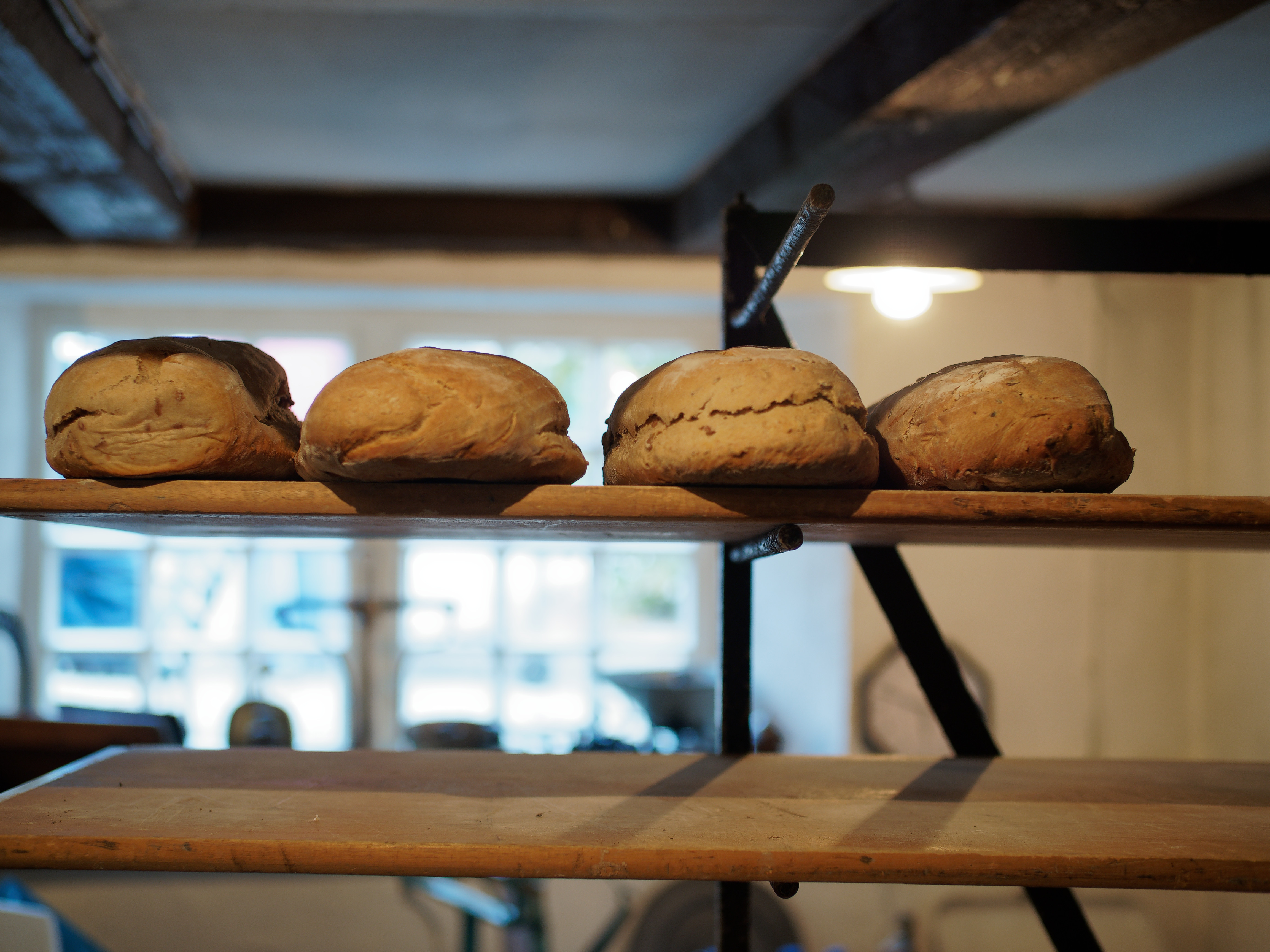 Beim monatlichen Backtag im Brenscheider Backhaus - frisch gebackene Brote.